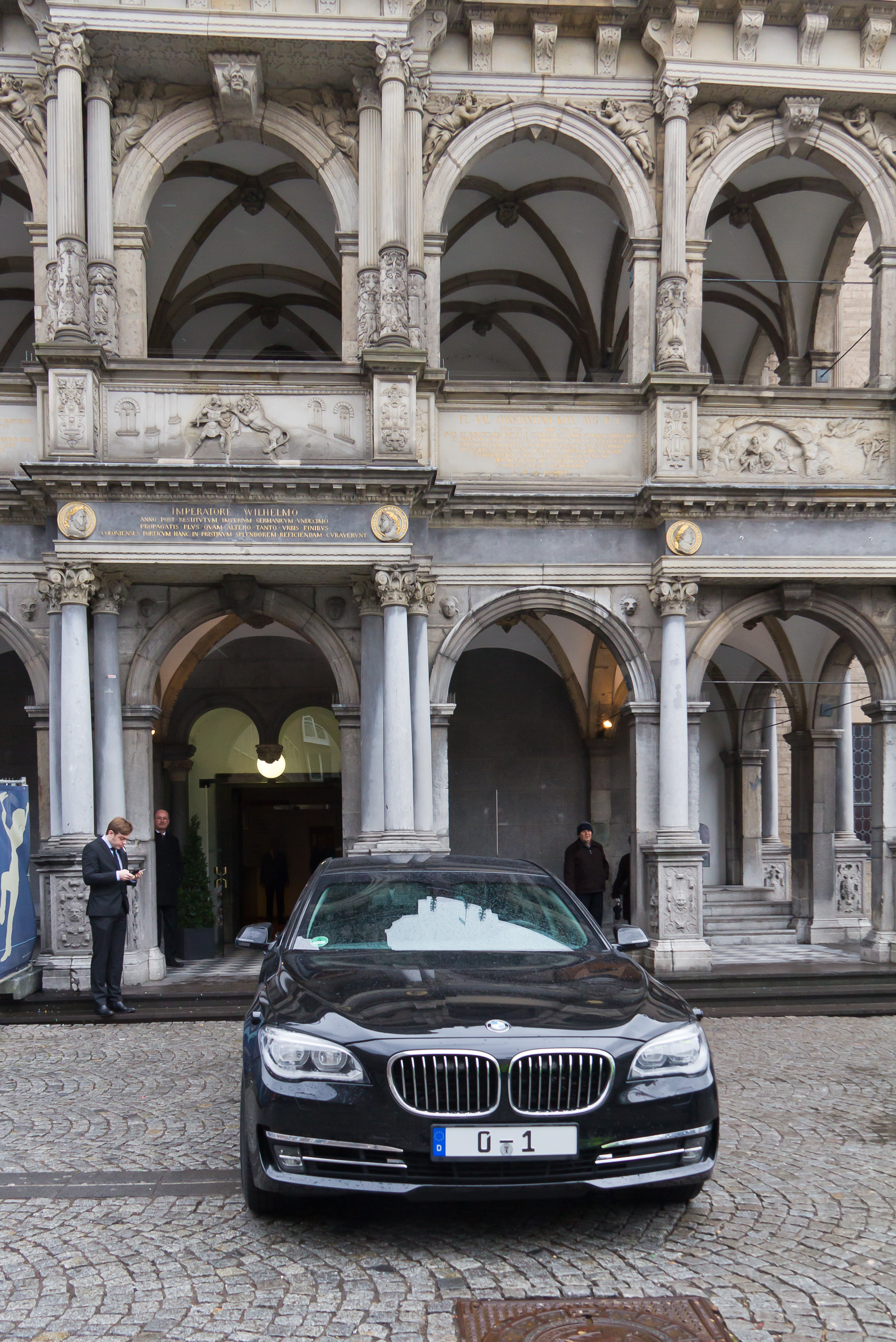 Erster offizieller Besuch von Bundespräsident Joachim Gauck im Kölner Rathaus. Foto: Der Dienstwagen des Bundespräsidenten mit dem Kennzeichen „0-1“ vor dem Historischen Rathaus von Köln